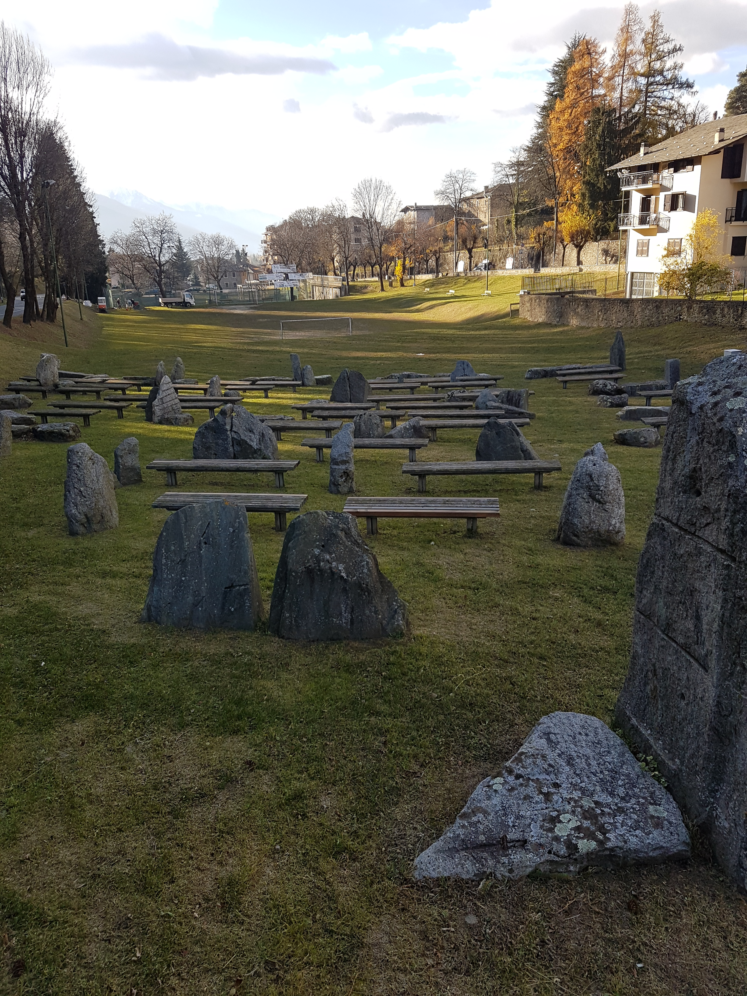 Spazio di pietra, località Teglio